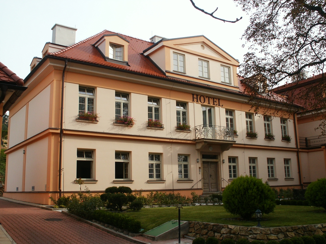 Usedlost Kuchyňka, Praha 8-Libeň, Květinářská 755/35